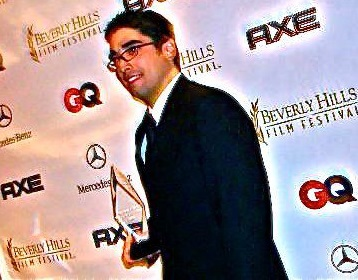 Fotografía en el Beverly Film Festival